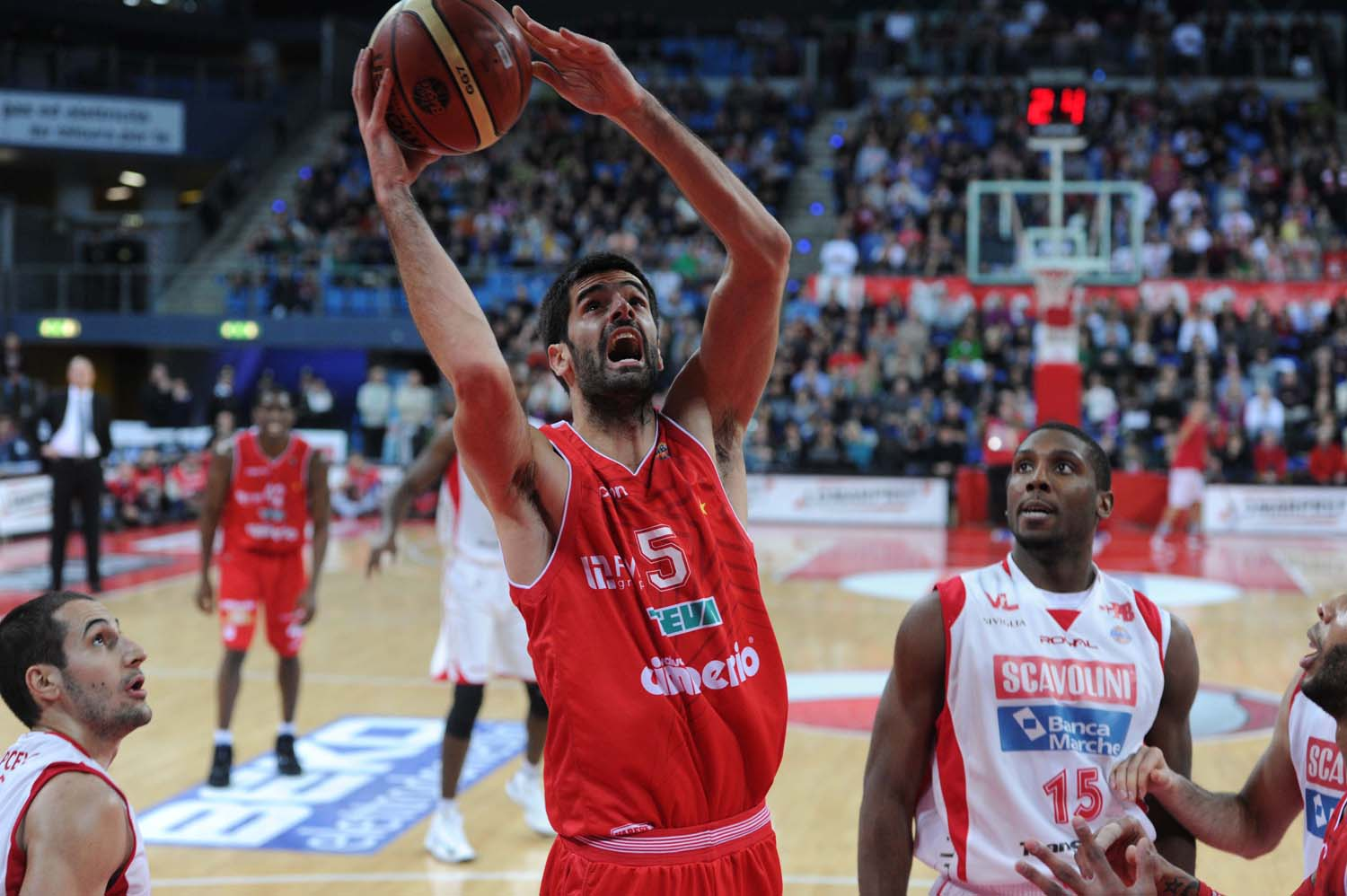 In primo piano: Dusan Sakota (maglia n. 5) e Lamont Mack (n. 15)